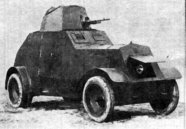 Source: Witold Jeleń, Rajmund Szubański: "Samochód pancerny wz.29"; TBiU nr 84; Warszawa 1983.